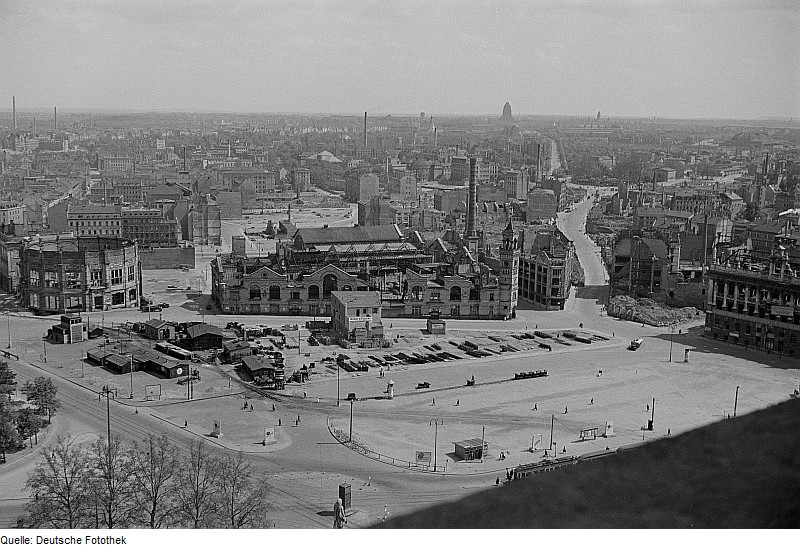 Original image description from the Deutsche Fotothek Blick vom Neuen Rathaus auf den Wilhelm-Leuschner-Platz